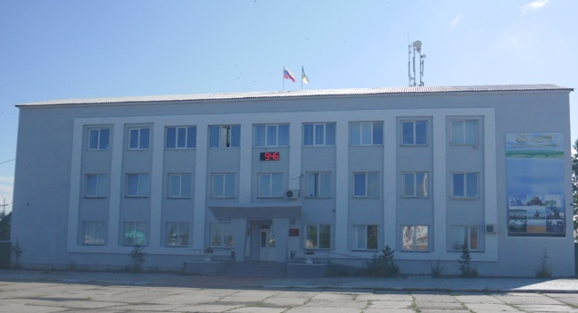 Здание администрации в Сосново-Озерске